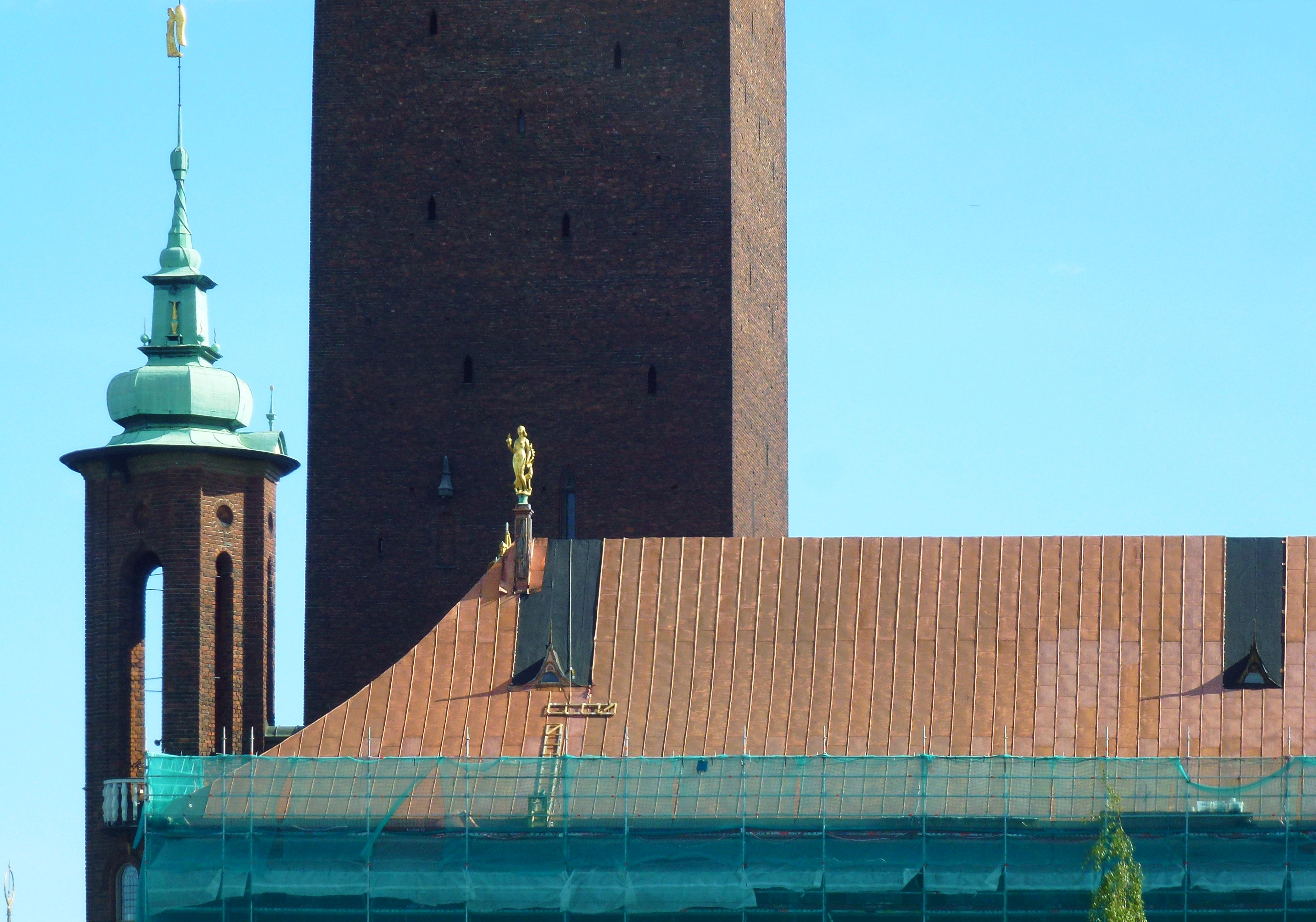 Stockholms stadshus: Norra längan får nytt koppartak